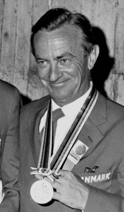 Left-right: Ole Berntsen, Christian von Bülow, Ole Poulsen